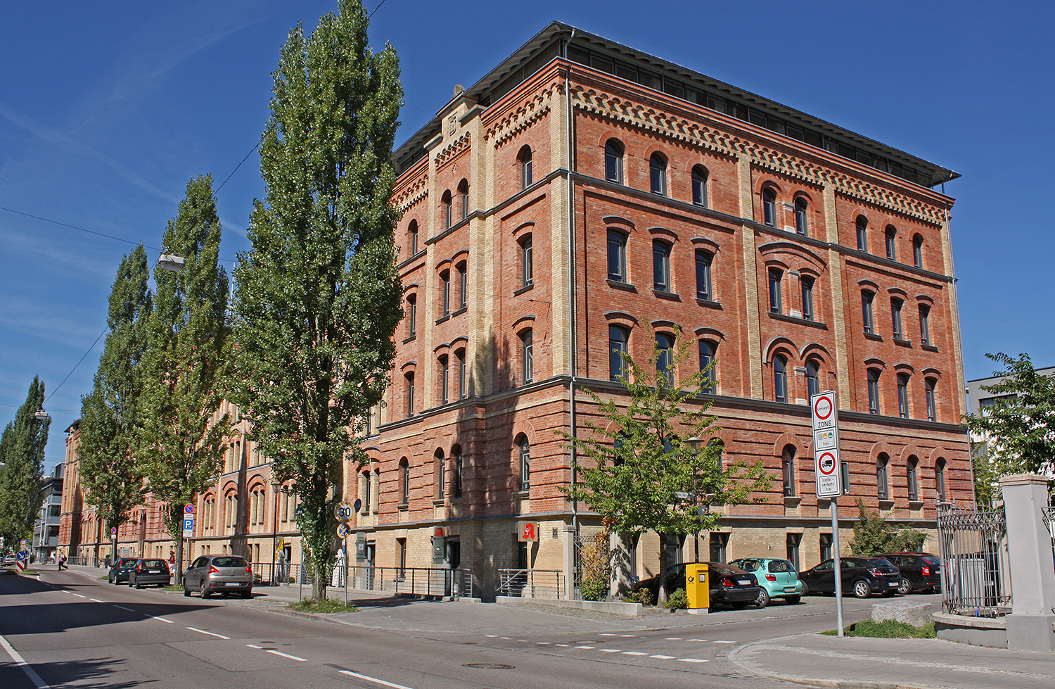 Südtrakt der Prinz-Karl-Kaserne, Schertlinstraße 21 bis 25, AugsburgThis is a photograph of an architectural monument.